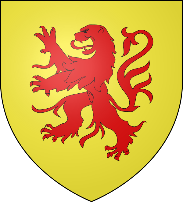 Arrmes d'or au lion rampant de gueules